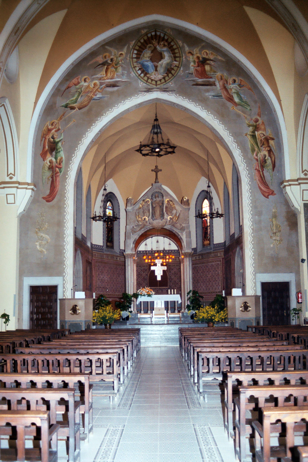 Interior de la Parróquia de Sallent